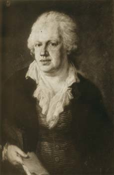 Bild: Der deutsche Dichter und Intendant Joseph Marius von Babo (1756-1822)